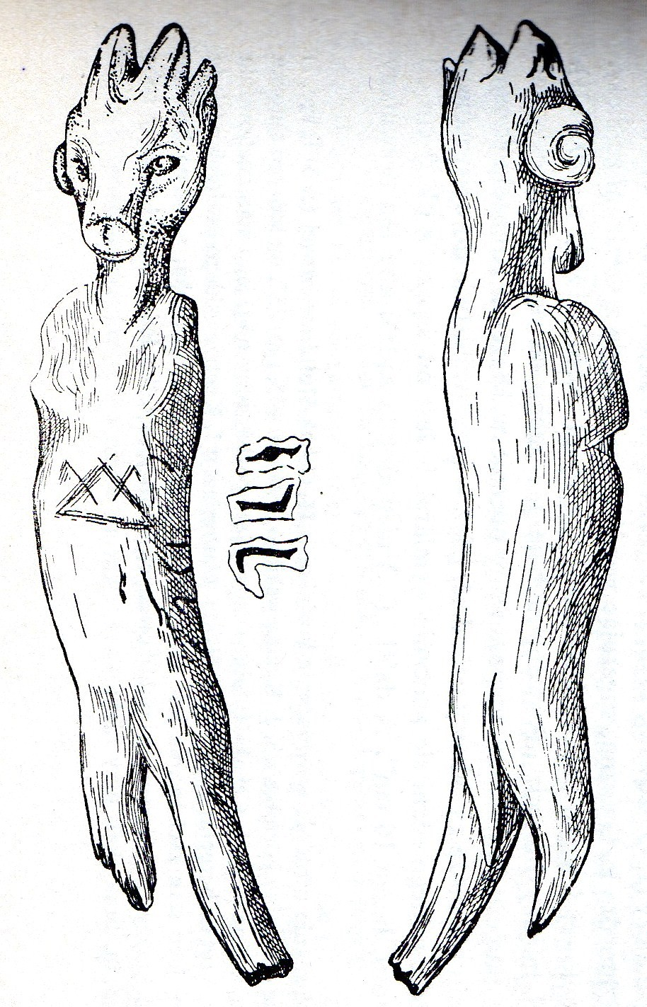 Tzw. Koziołek lednicki (fałszerstwo archeologiczne).